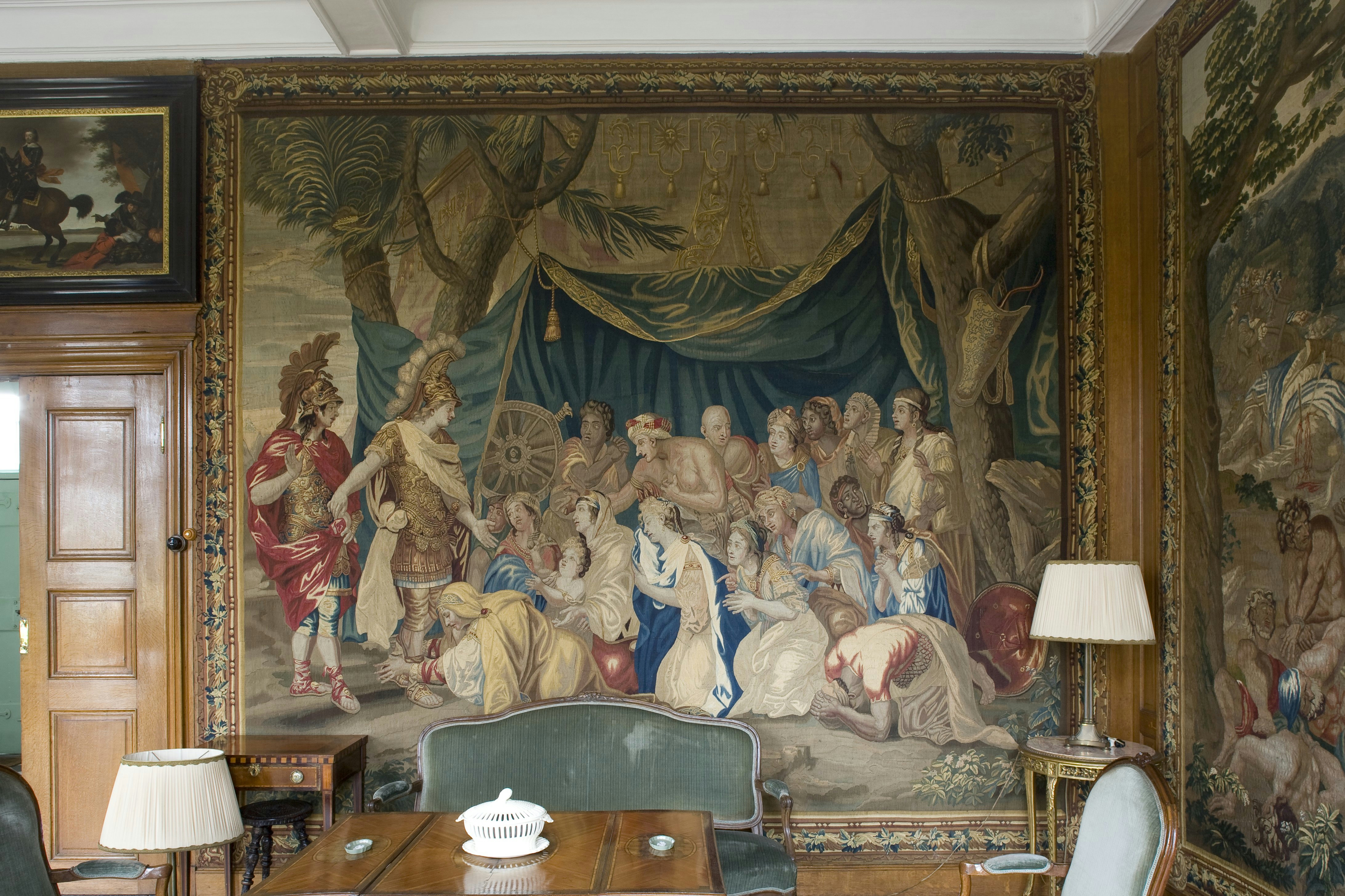 Kasteel Heeze: Interieur, overzicht van een gobelin in de grote salon op de begane grond